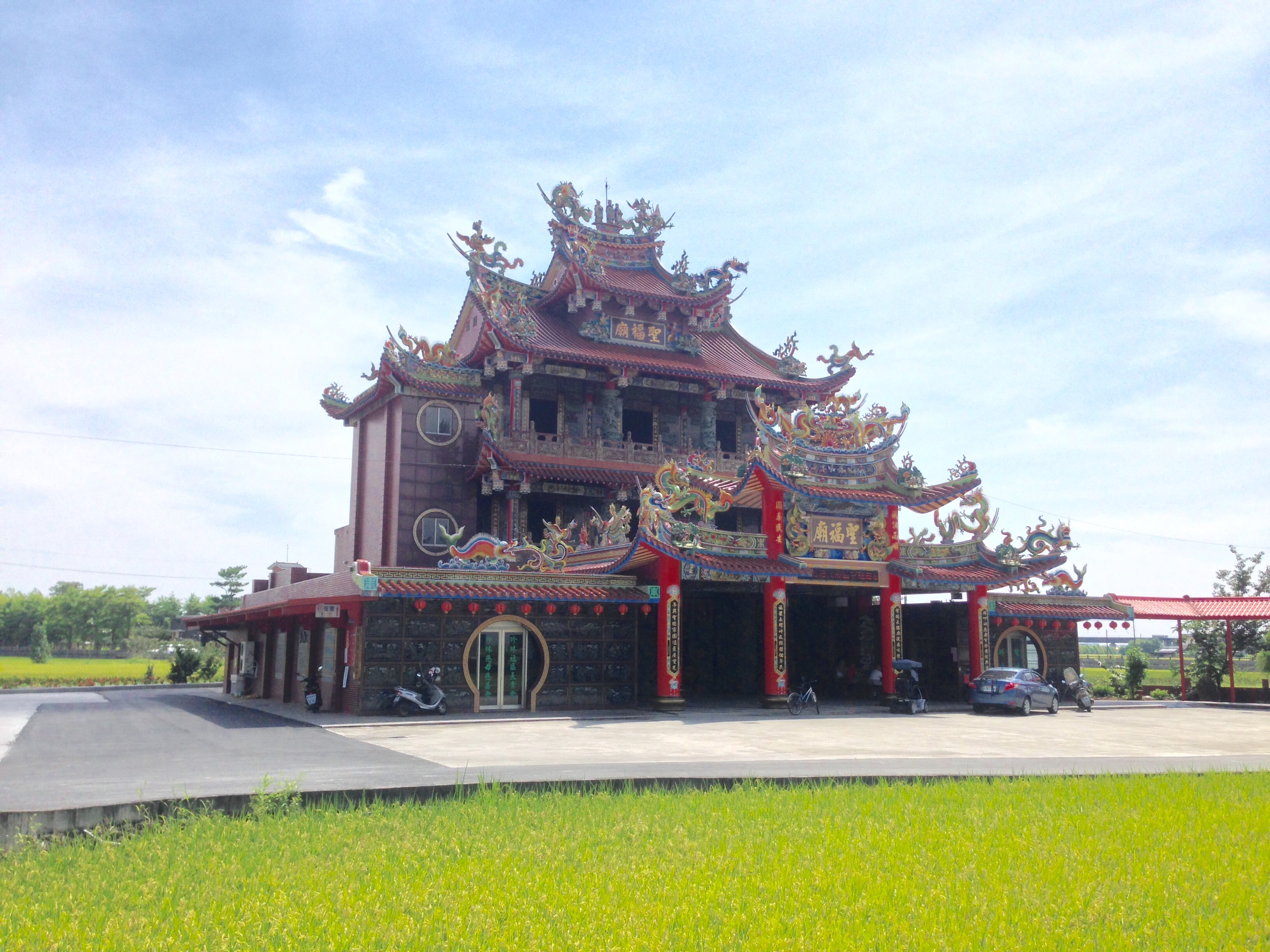 冬山鄉珍珠村聖福廟